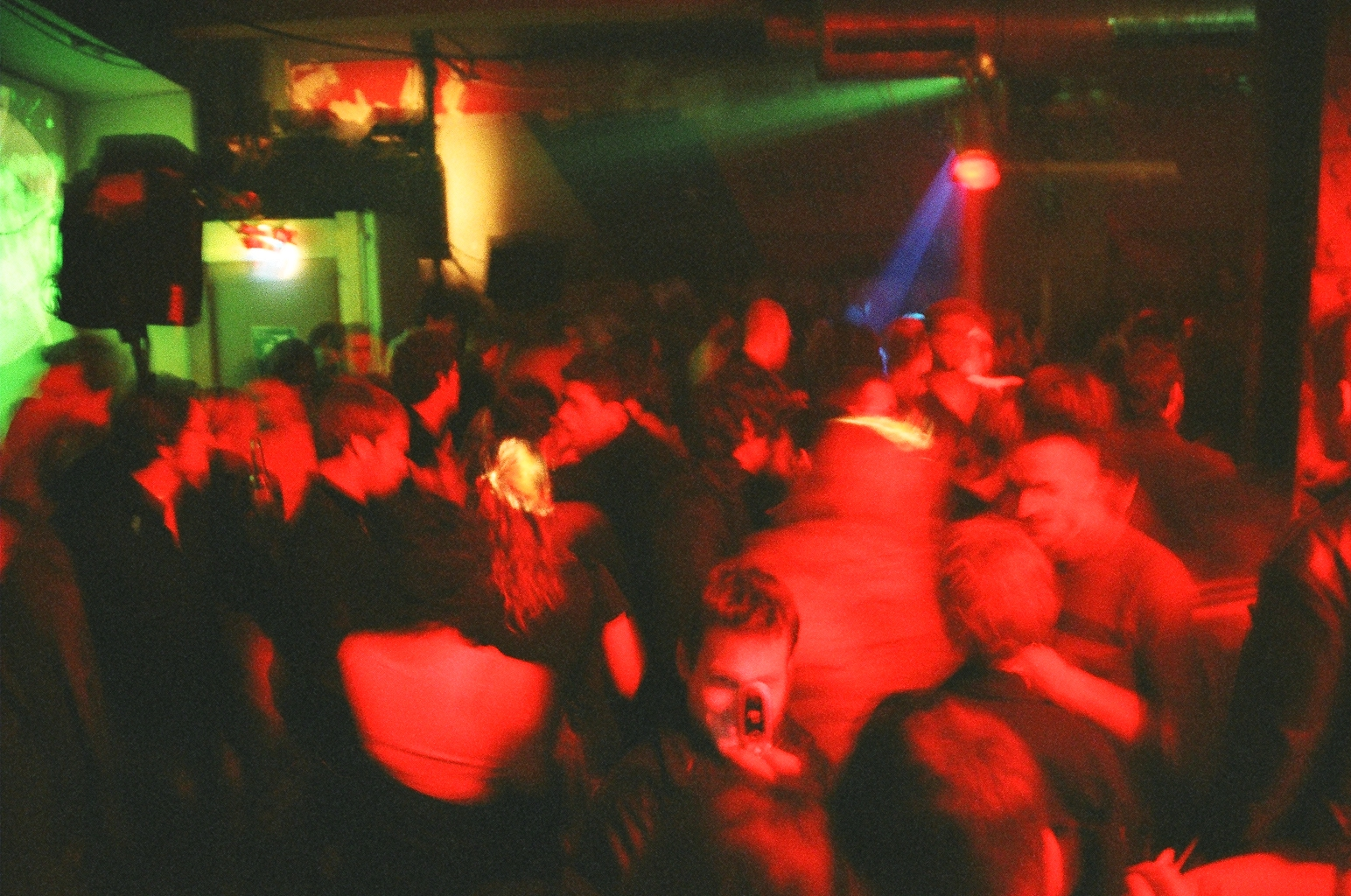 Motive: Discoteque in Berlin Foto: Julica da Costa